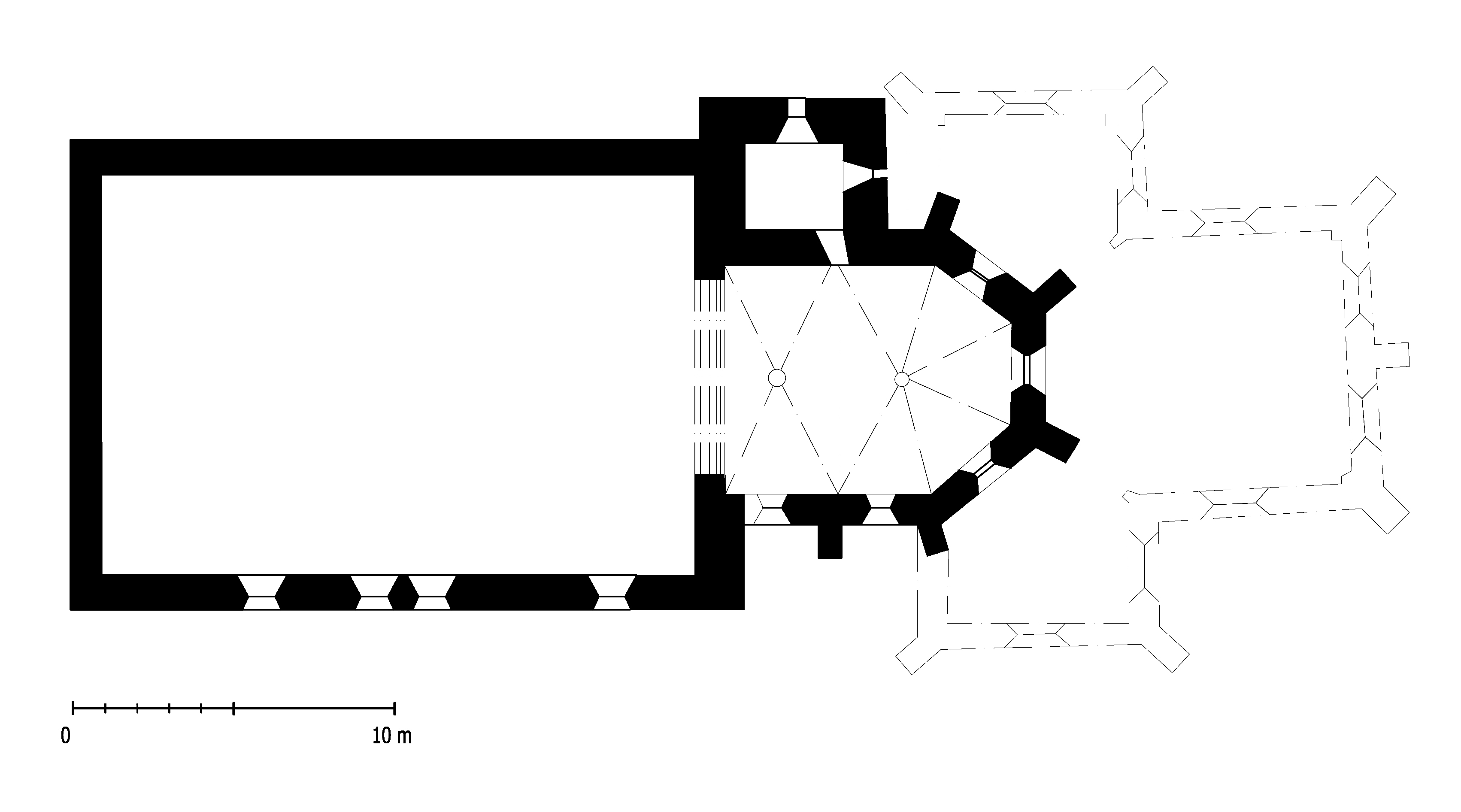 Půdorys objektu.